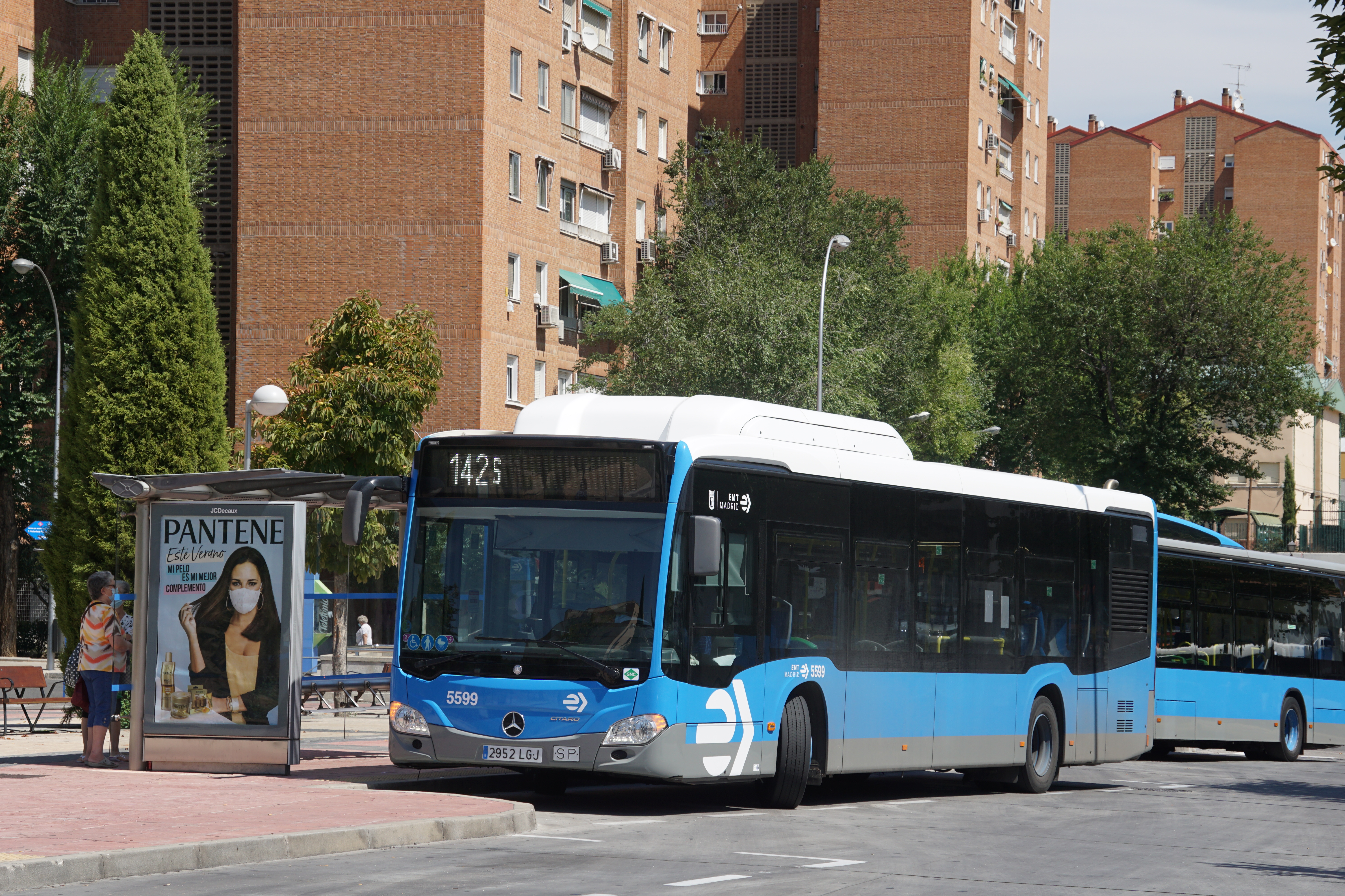 141 EMT Madrid en el final de Pavones